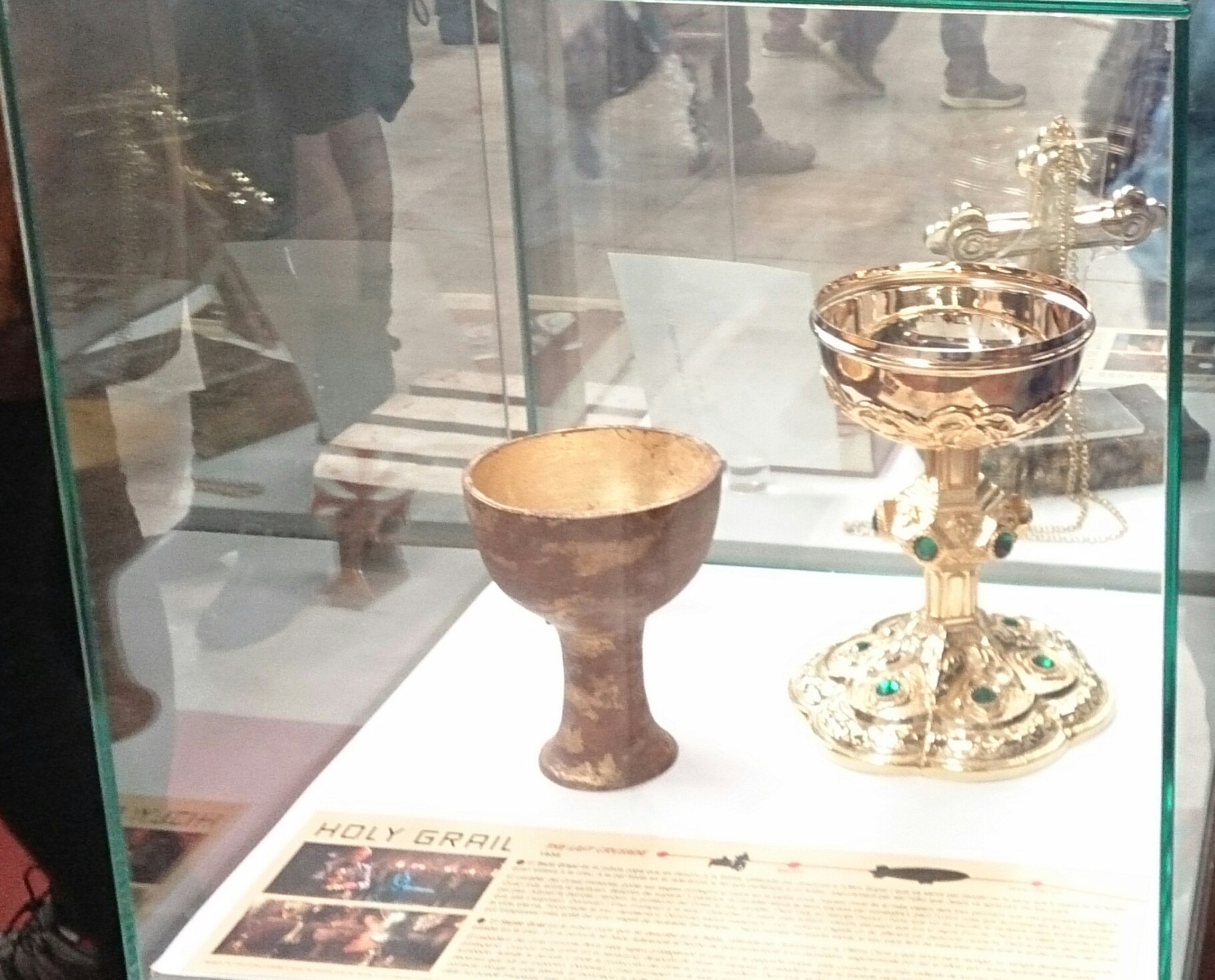 Santo Grial última cruzada de Indiana Jones salón del cine Barcelona 2016